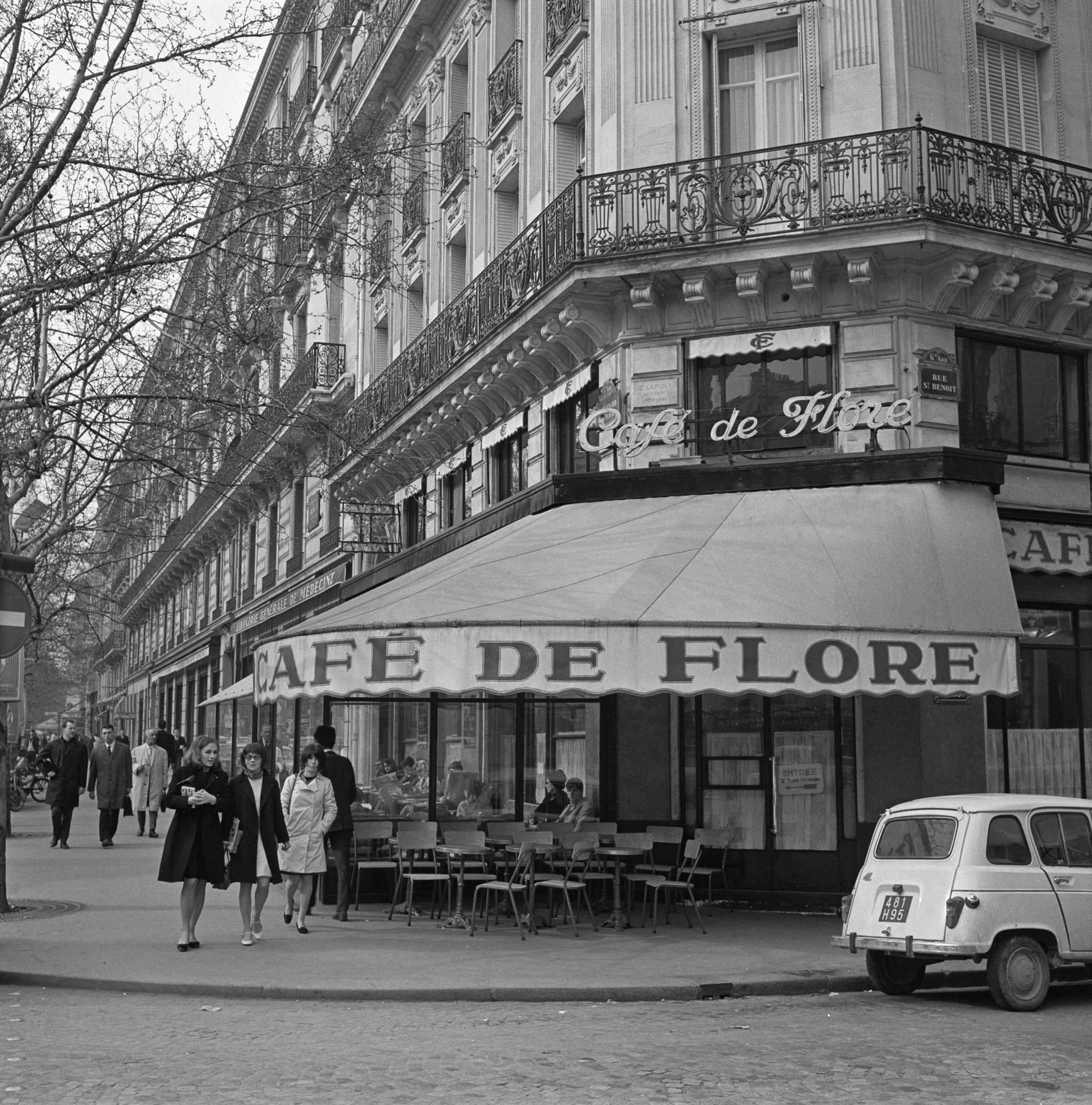 Collectie / Archief : Fotocollectie Van de Poll Reportage / Serie : Pariser Bilder [Het straatleven van Parijs] Beschrijving : Café de Flore in Saint-Germain-des-Prés Annotatie : Wijk in het zesde en zevende arrondissement van Parijs, van oudsher bevolkt door kunstenaars, studenten en intellectuelen Datum : 1965 Locatie : Frankrijk, Parijs Trefwoorden : cafés, straatbeelden, terrassen Instellingsnaam : Saint-Germain des Prés Fotograaf : Poll, Willem van de Auteursrechthebbende : Nationaal Archief Materiaalsoort : Negatief (6x6) Nummer archiefinventaris : bekijk toegang 2.24.14.02 Bestanddeelnummer : 254-0635